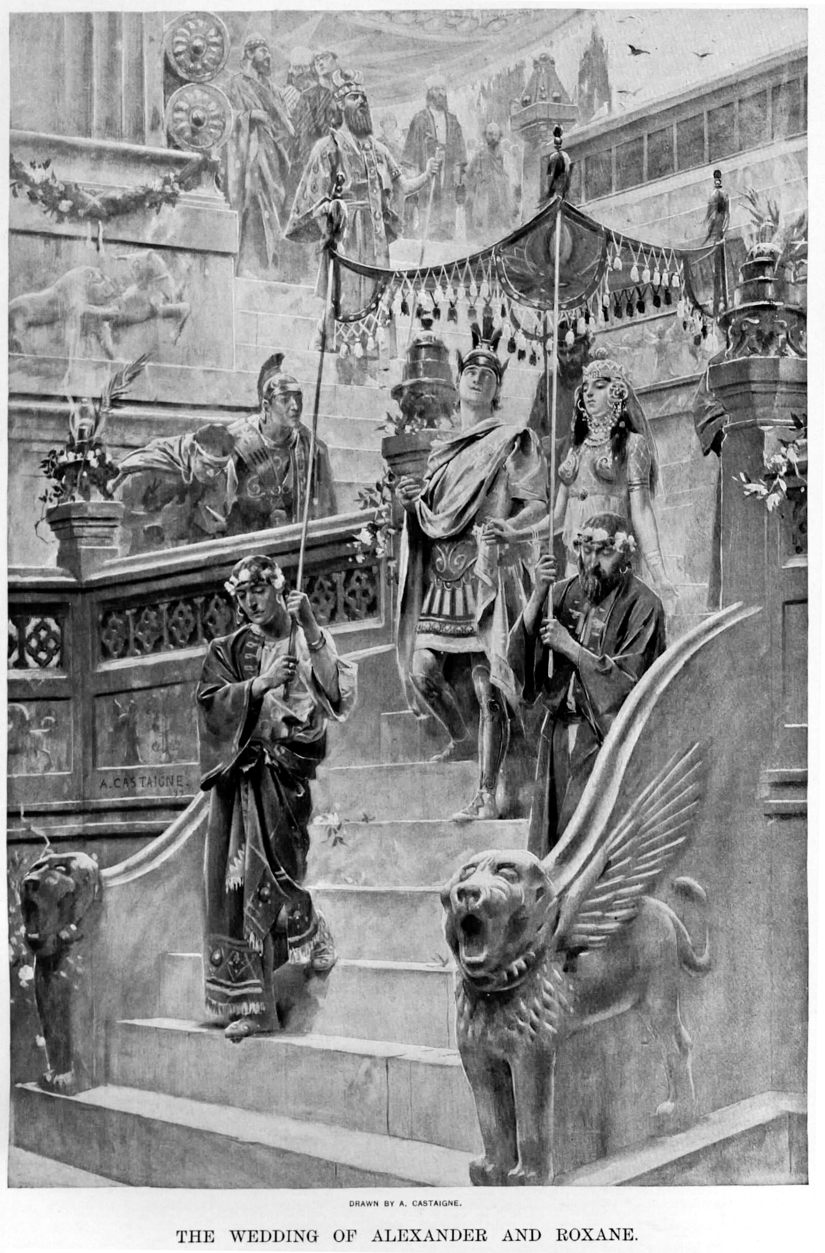 Alexander old drawings